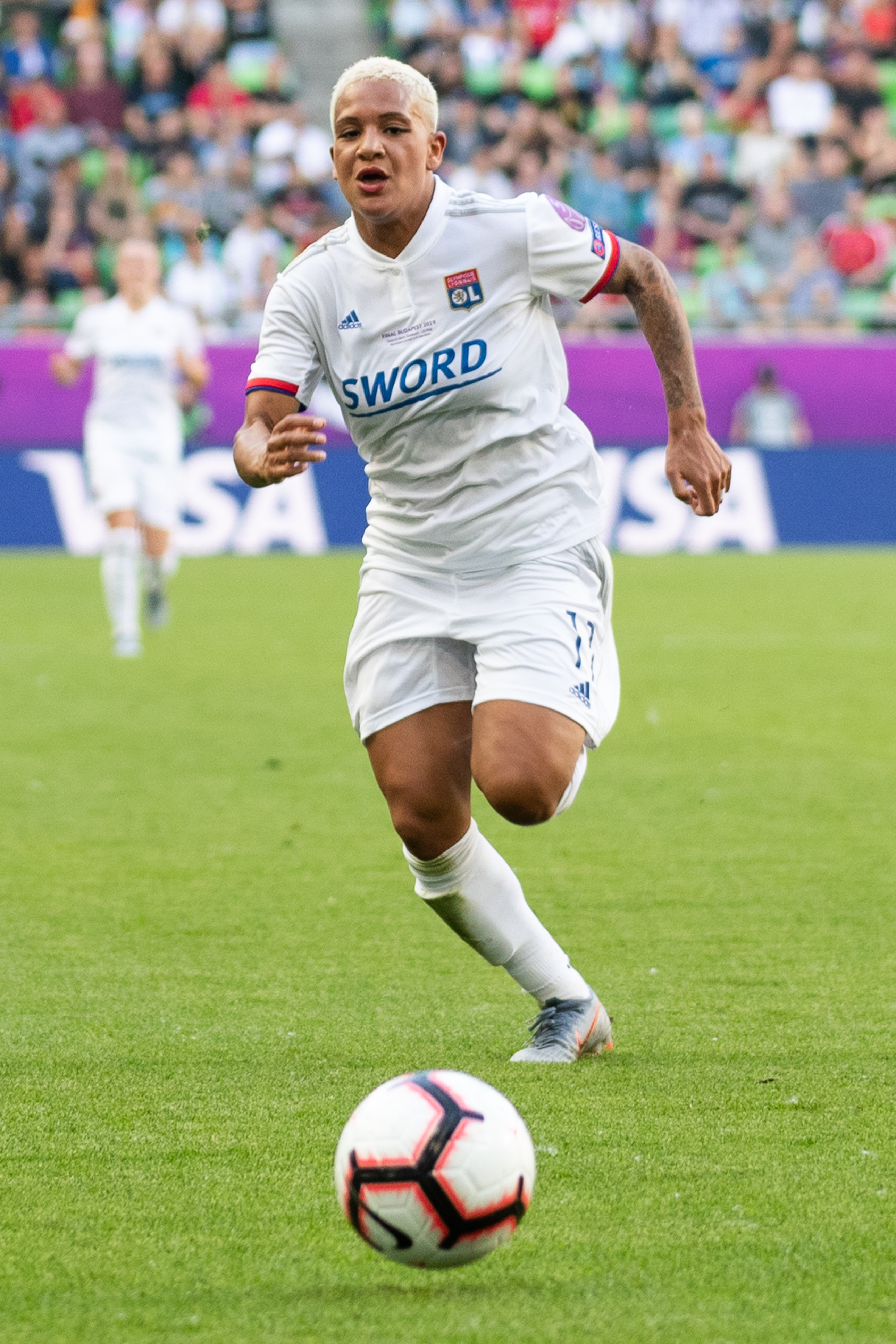 Fußball, Frauen, UEFA Women's Champions League, Olympique Lyonnais - FC Barcelona; Shanice van de Sanden (Olympique Lyon, 11); Freisteller, Einzelbild, Aktion, action